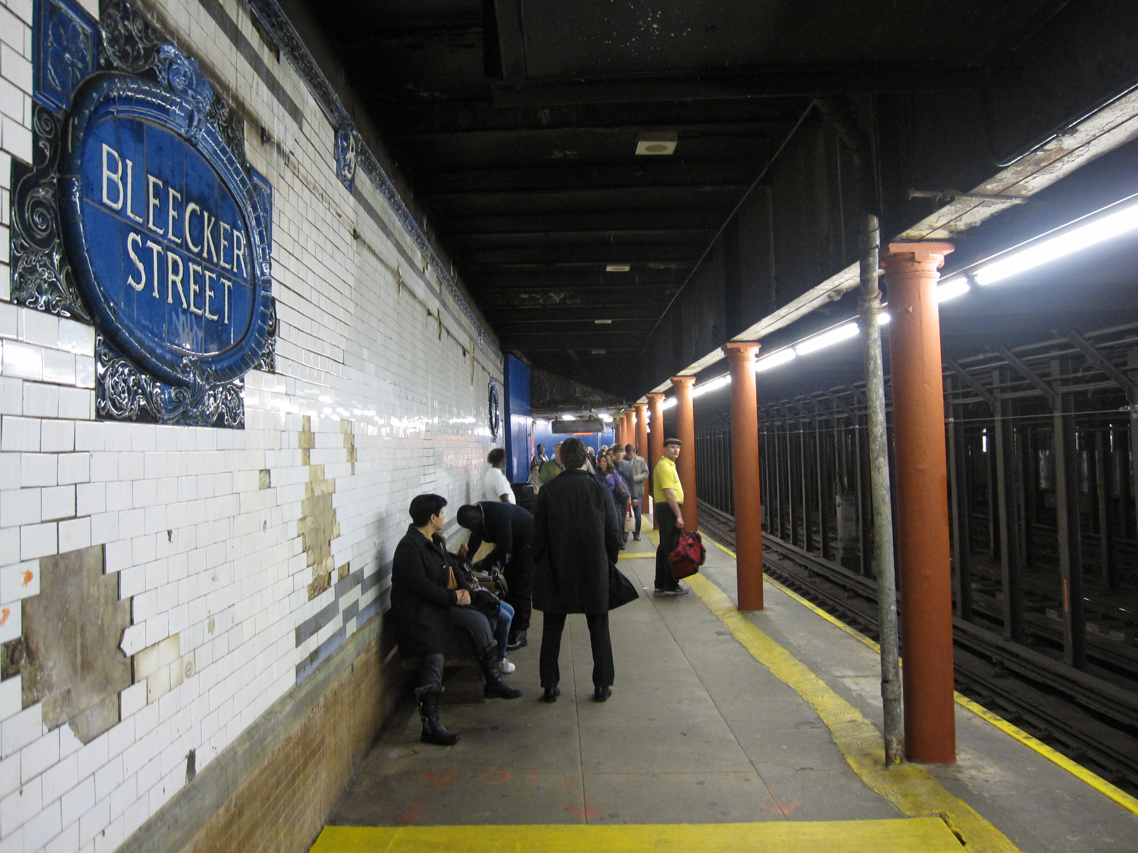 Bleecker Street (IRT Lexington Avenue Line)